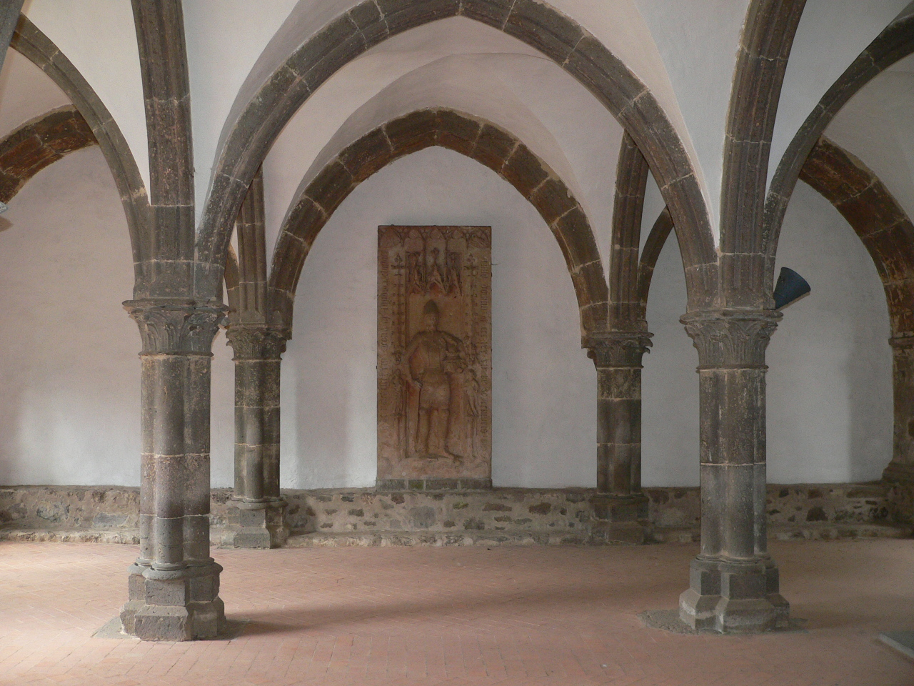 Kapitelsaal Kloster Arnsburg bei Lich, Hessen, Germany